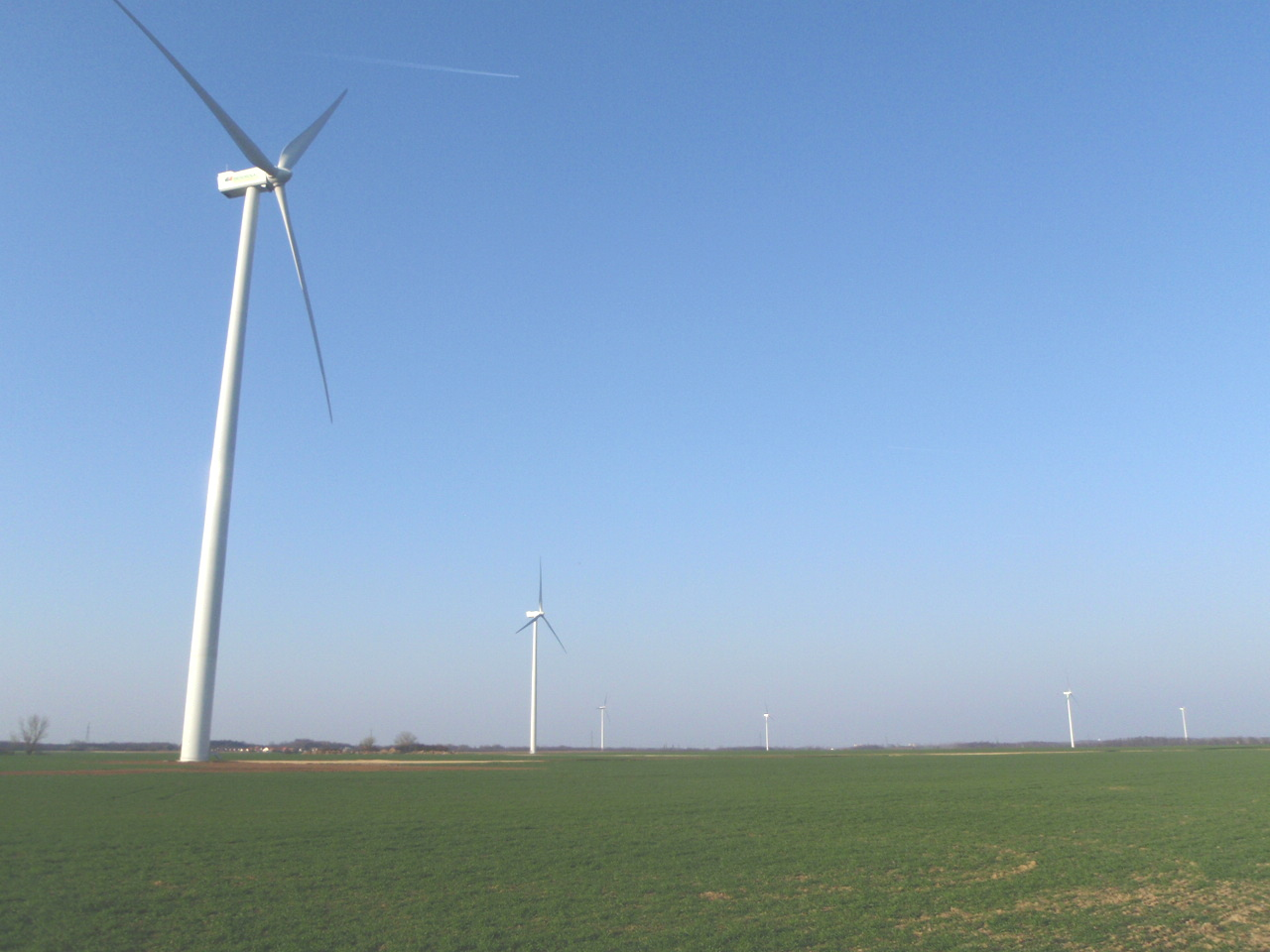 Windpark Ikervár, Richtung Szombathely